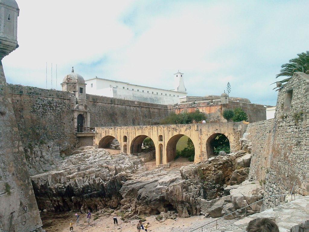 IMAG0754